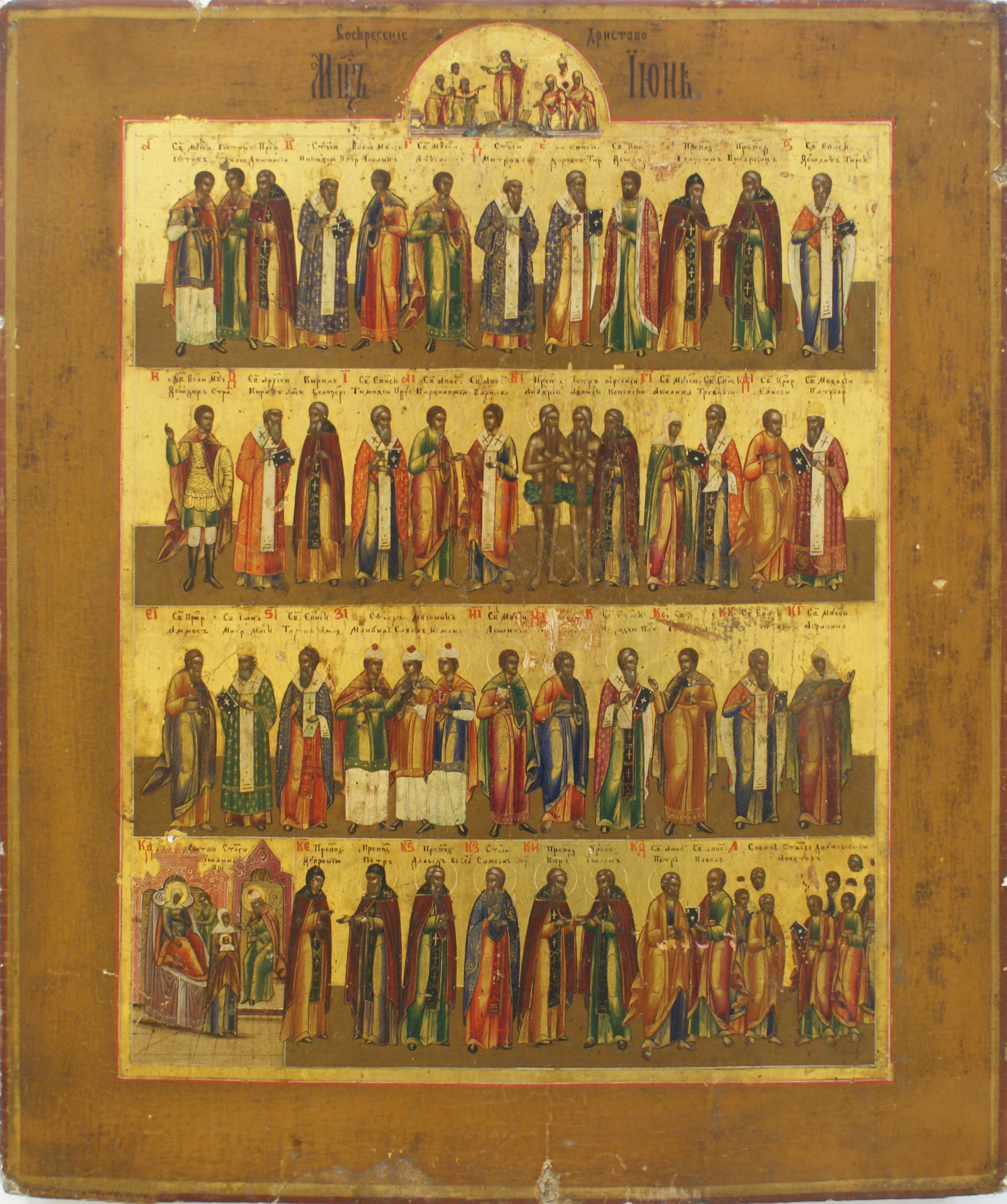 Абраз "Мінэя на ліпень" Расія, ляўкас, тэмпера